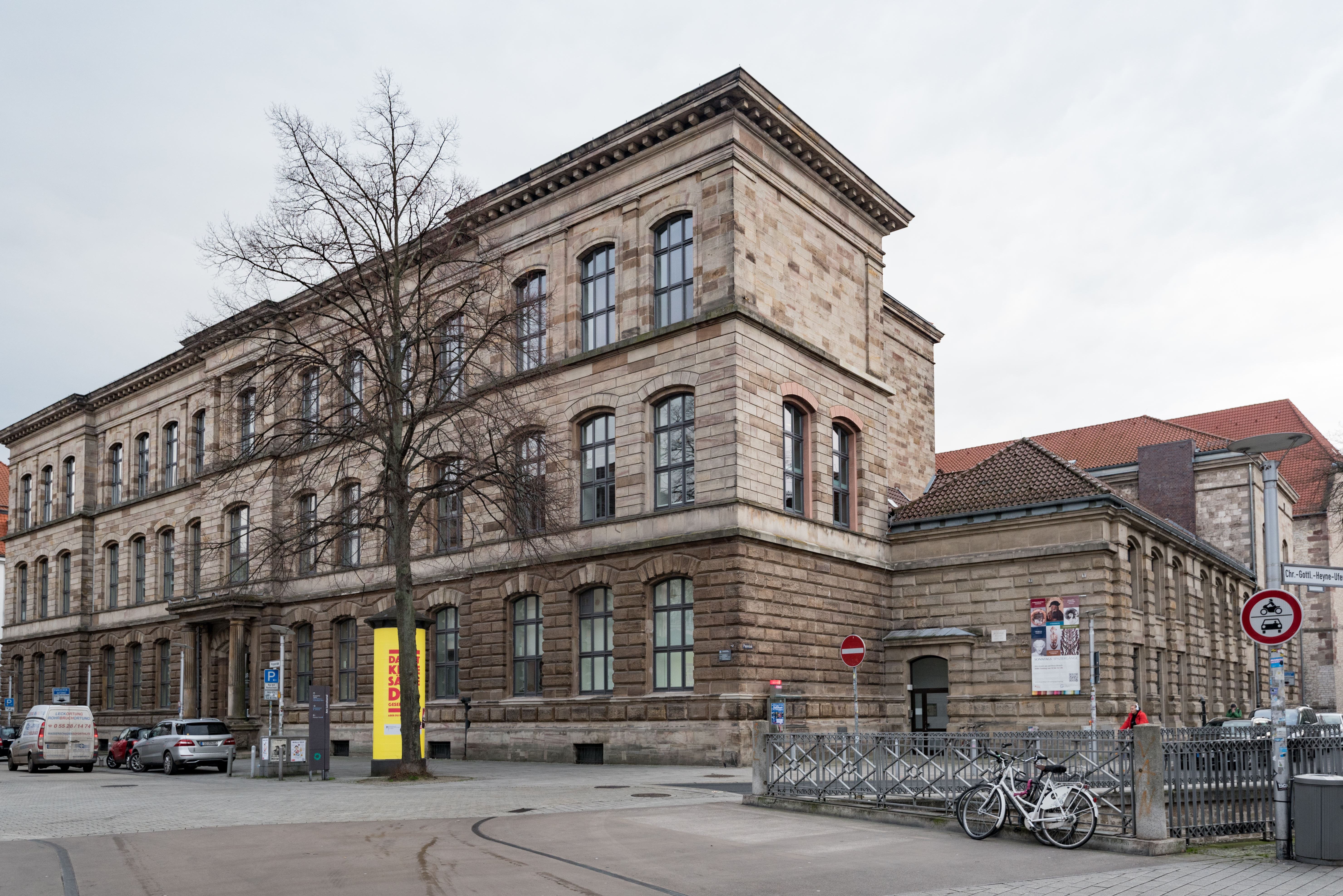 Göttingen, Prinzenstraße